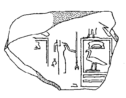 Weiteres Tonsiegel des Chaba (further clay seal of Khaba)